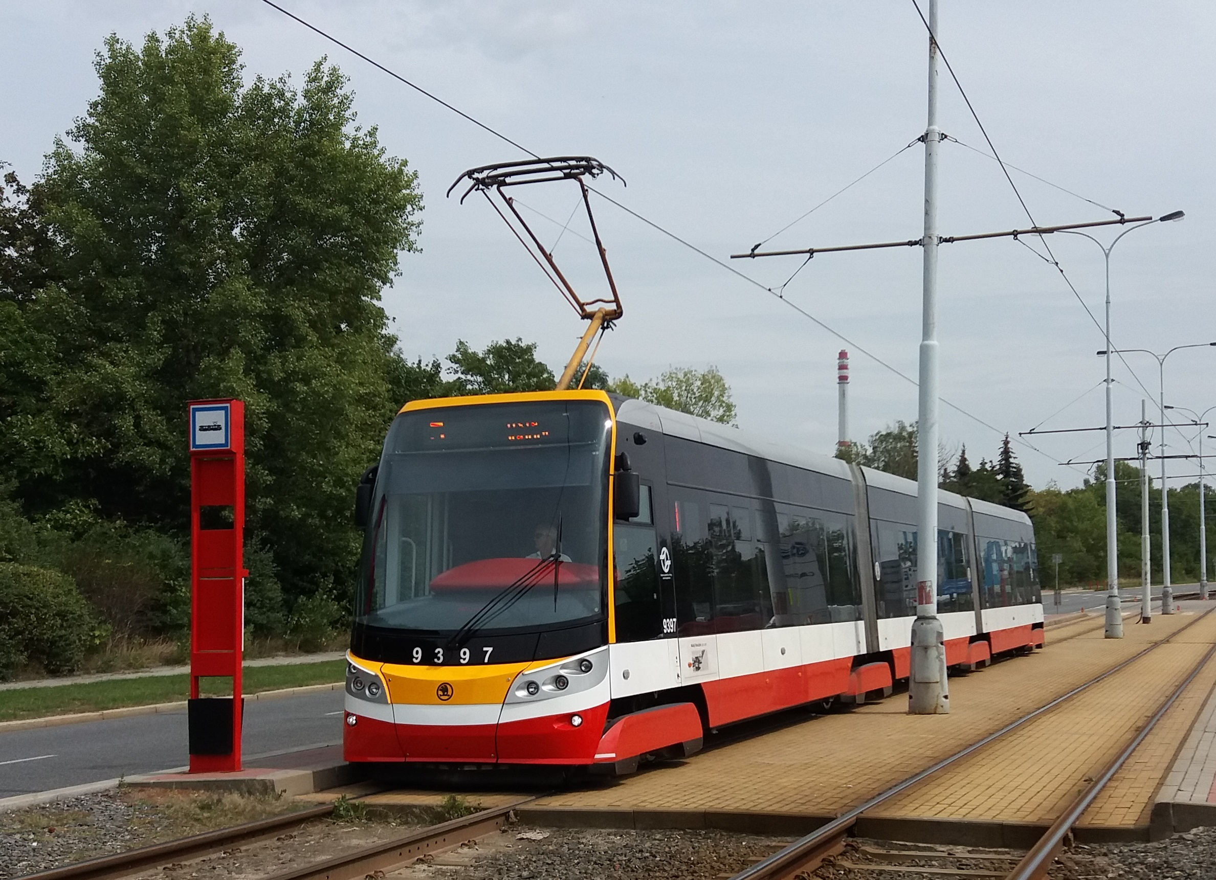 Tramvaj evidenční číslo 9397 v zastávce Malešická továrna.